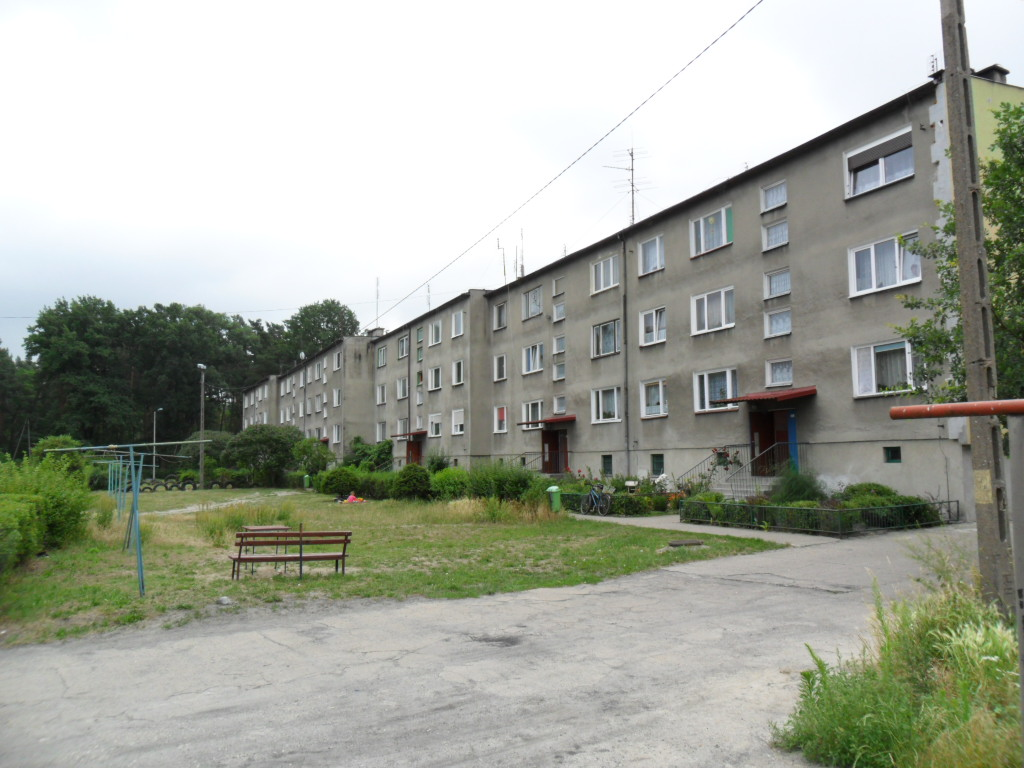 Grodziszcze